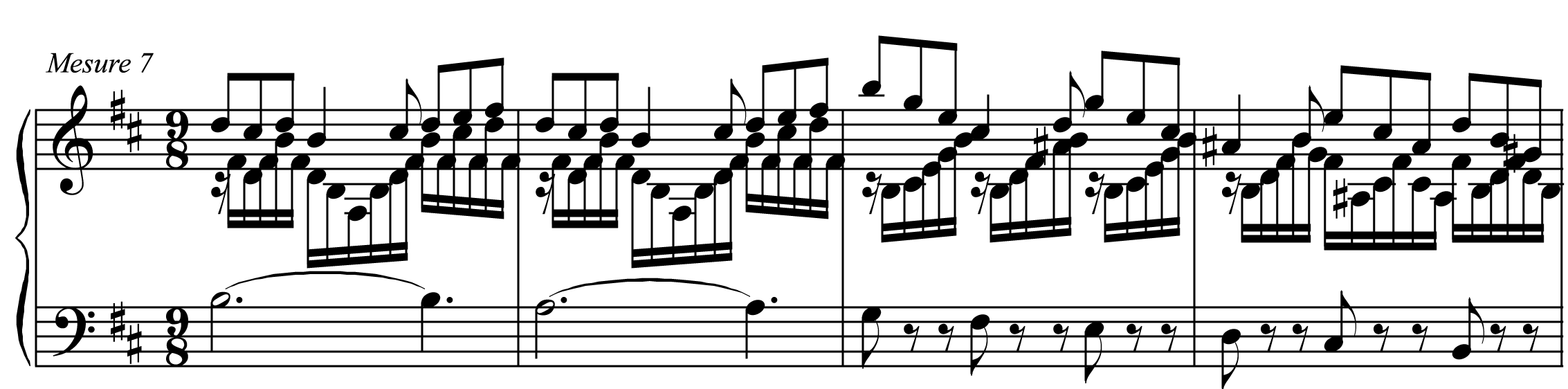 Extrait de partition de l'Opus 18 de Franck : Variation